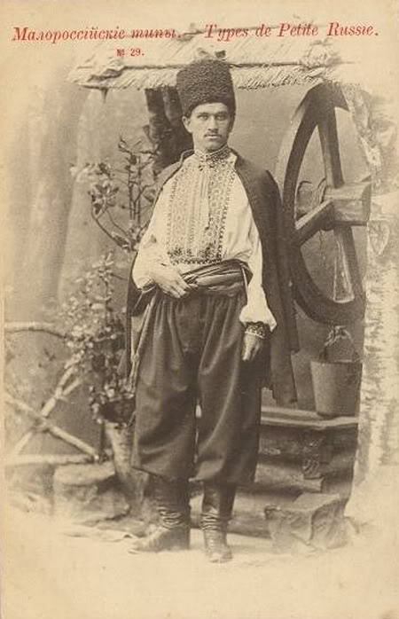 Українець: Українець